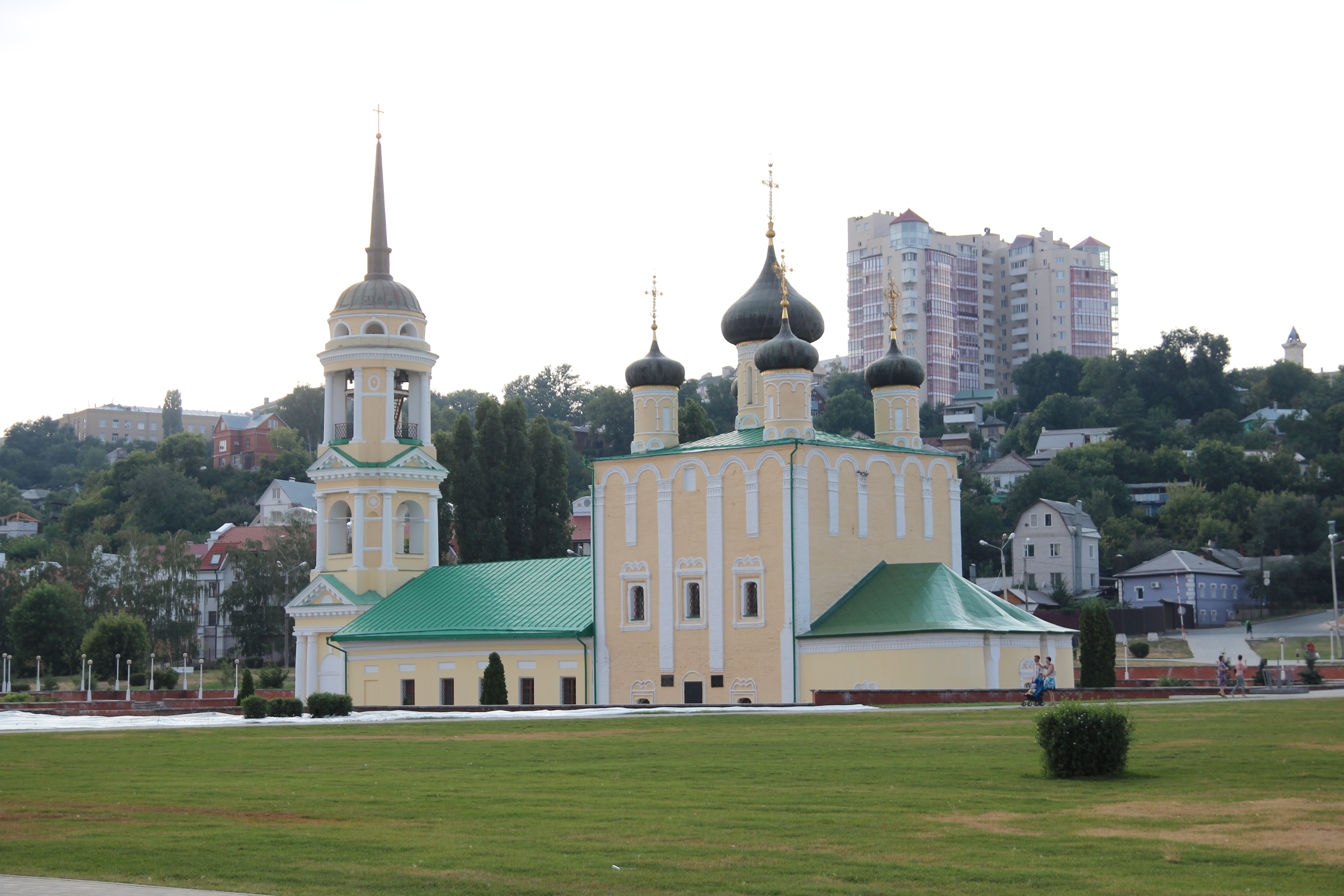 Успенский Адмиралтейский храм: улица Карла Маркса, 2 (улица Софьи Перовской, 9), Воронеж, Воронежская область